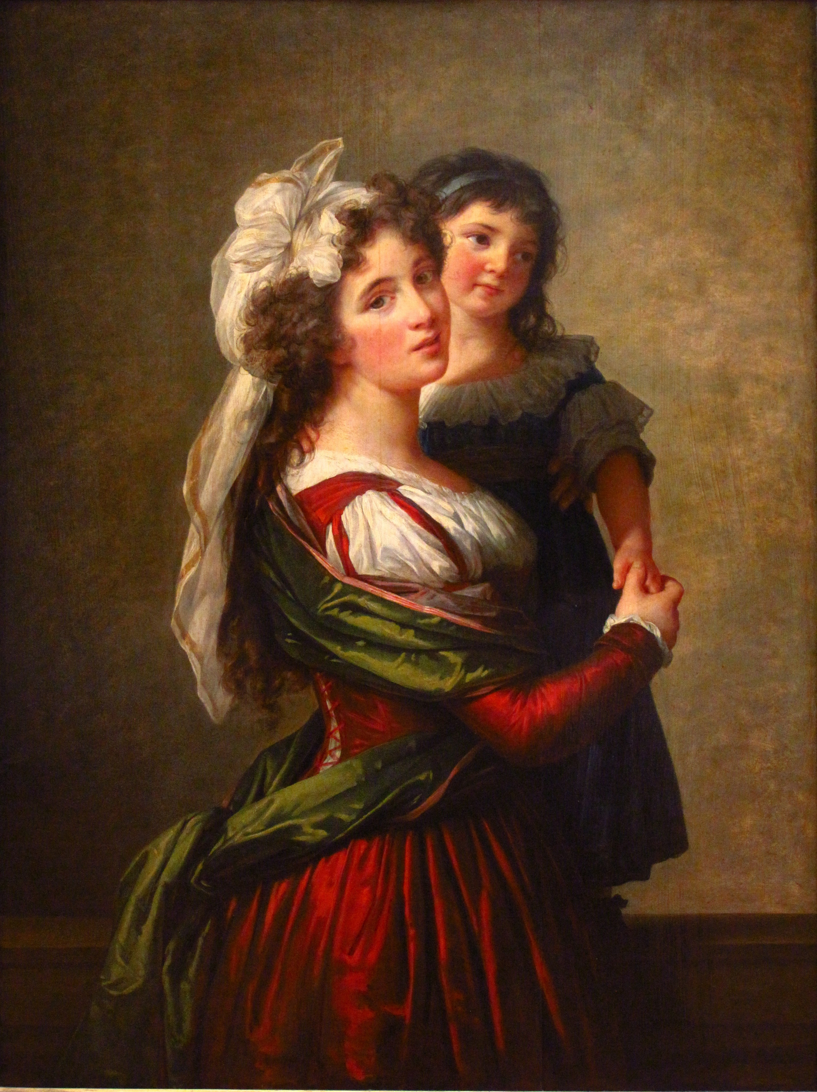 épouse et fille de l'architecte Pierre Rousseau.